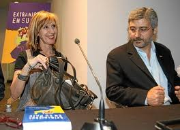 Antonio Robles junto a Rosa Diez